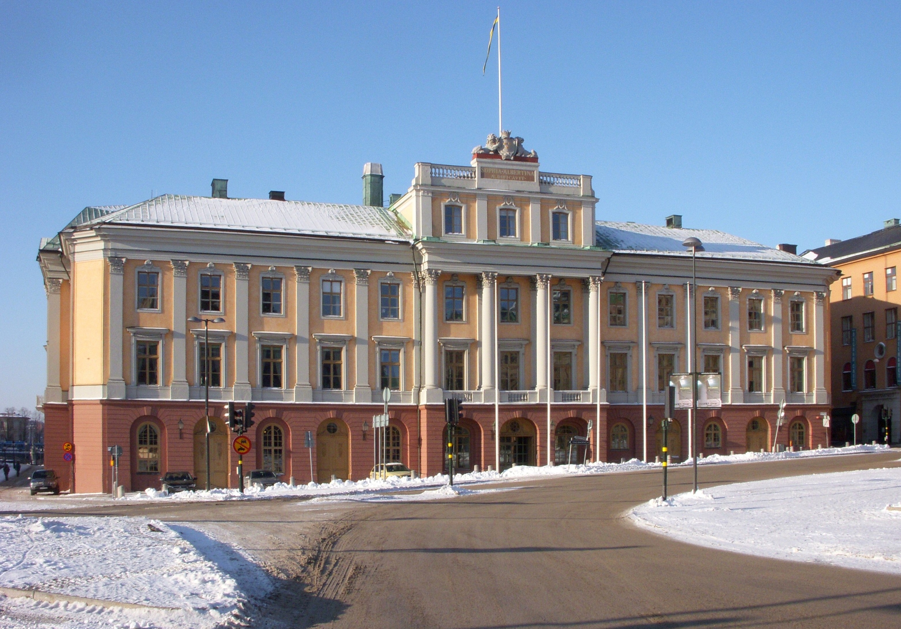 Arvfurstens palats i Stockholm, fasad mot öst